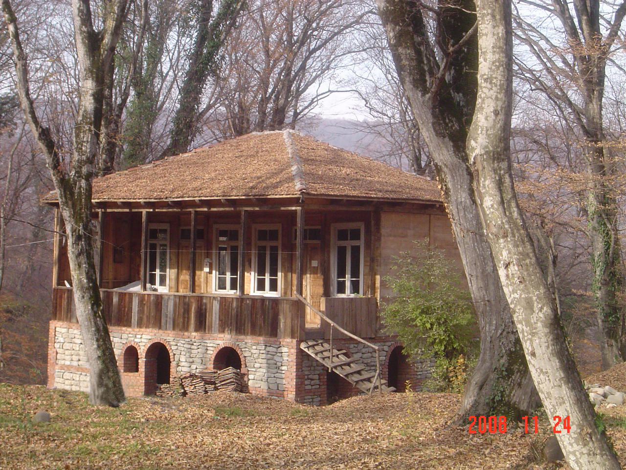 Жилище для монах, на территории монастыря.